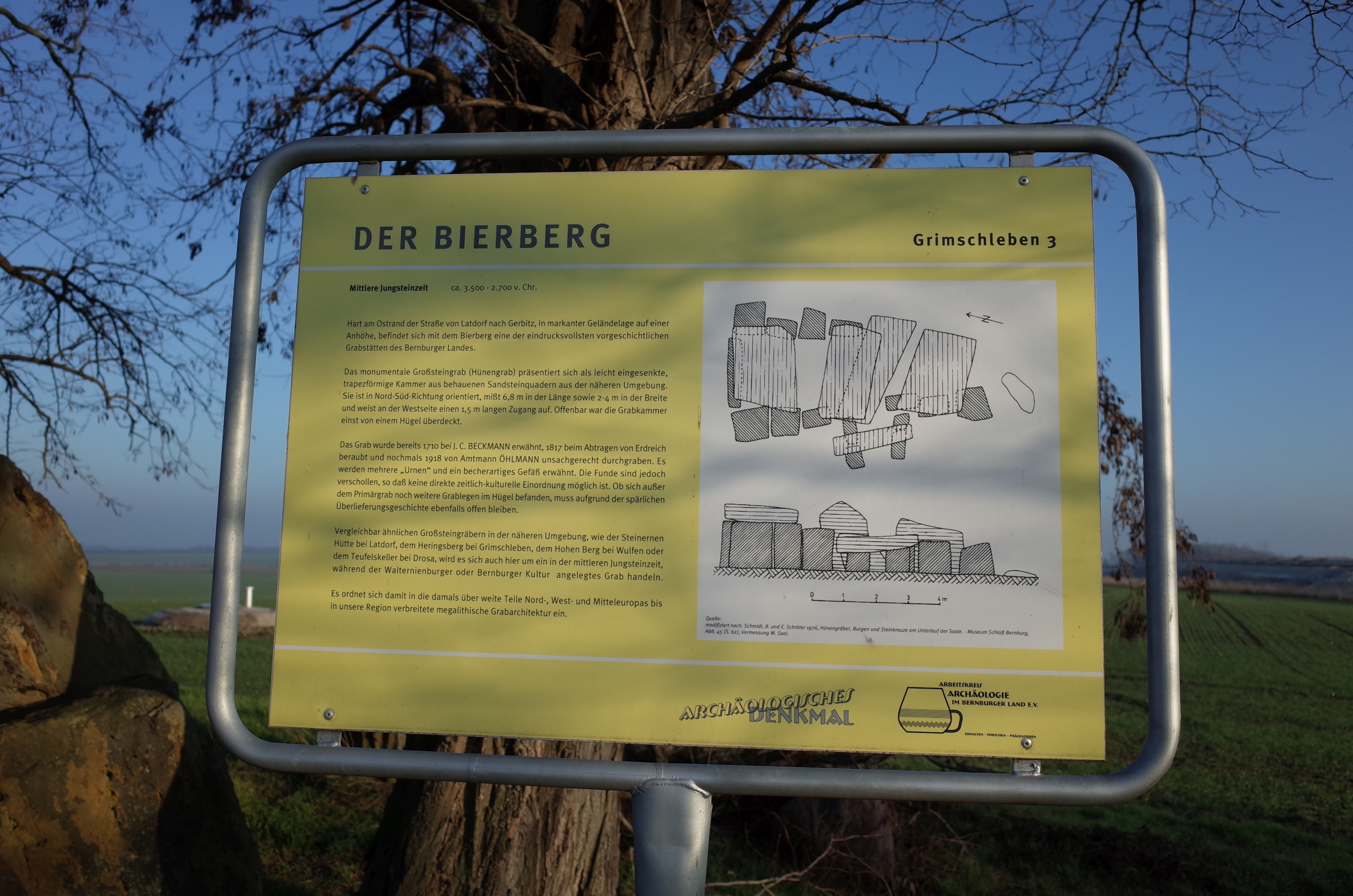 Nienburg (Saale), Ortsteil Latdorf, Großsteingrab Bierberg. Informationstafel vom Arbeitskreis Archäologie im Bernburger Land e.V.